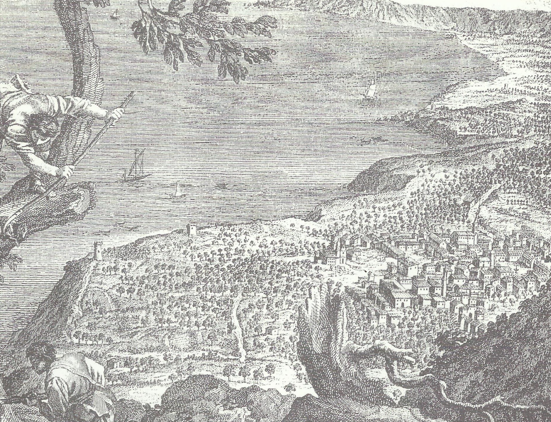 Palmi nel XVIII secolo in una stampa dell'epoca.